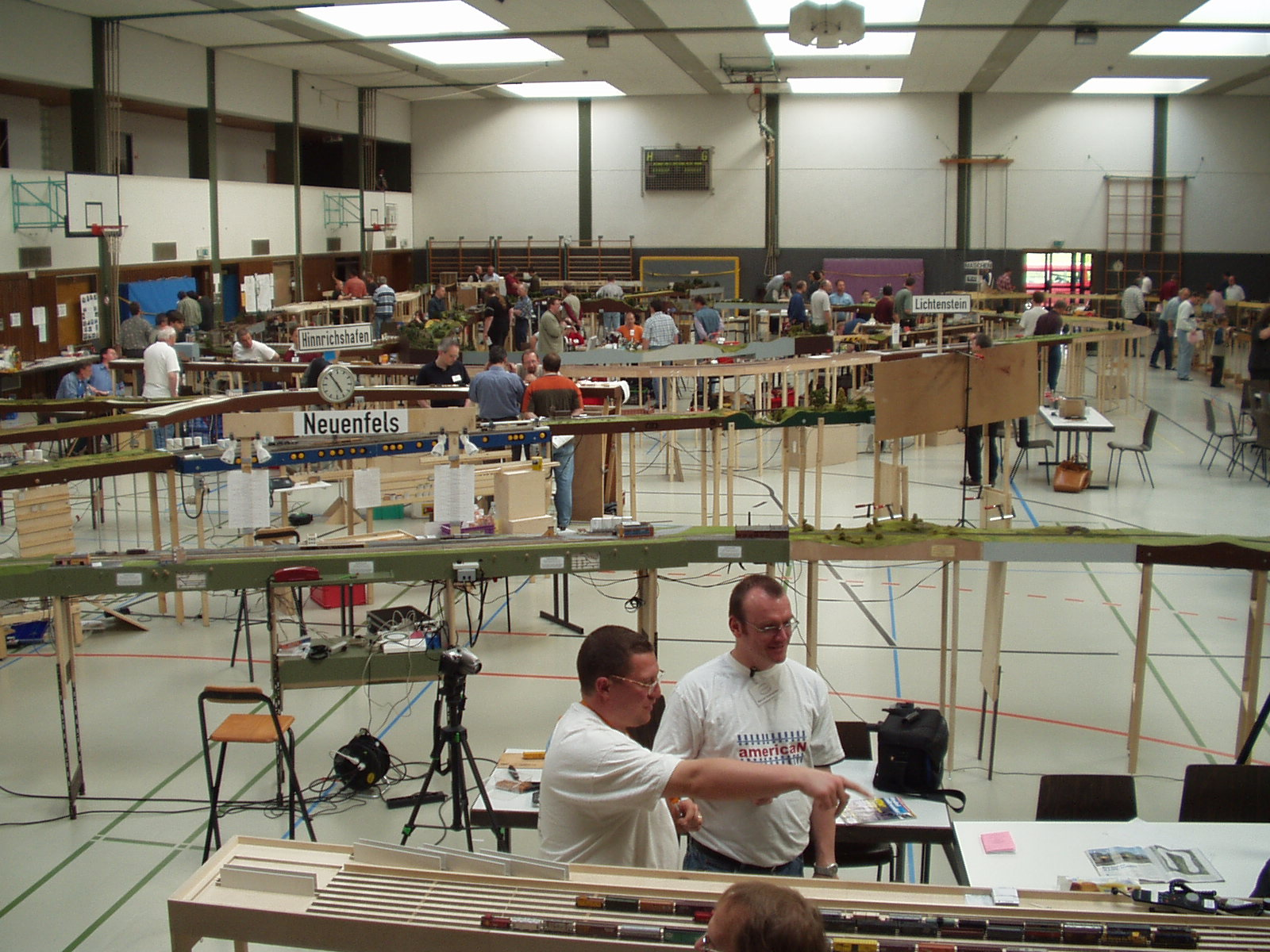 Übersicht FREMO-Jahrestagung 2003 in Calw. Verschiedene Modulanlagen in einer Dreifeldsporthalle